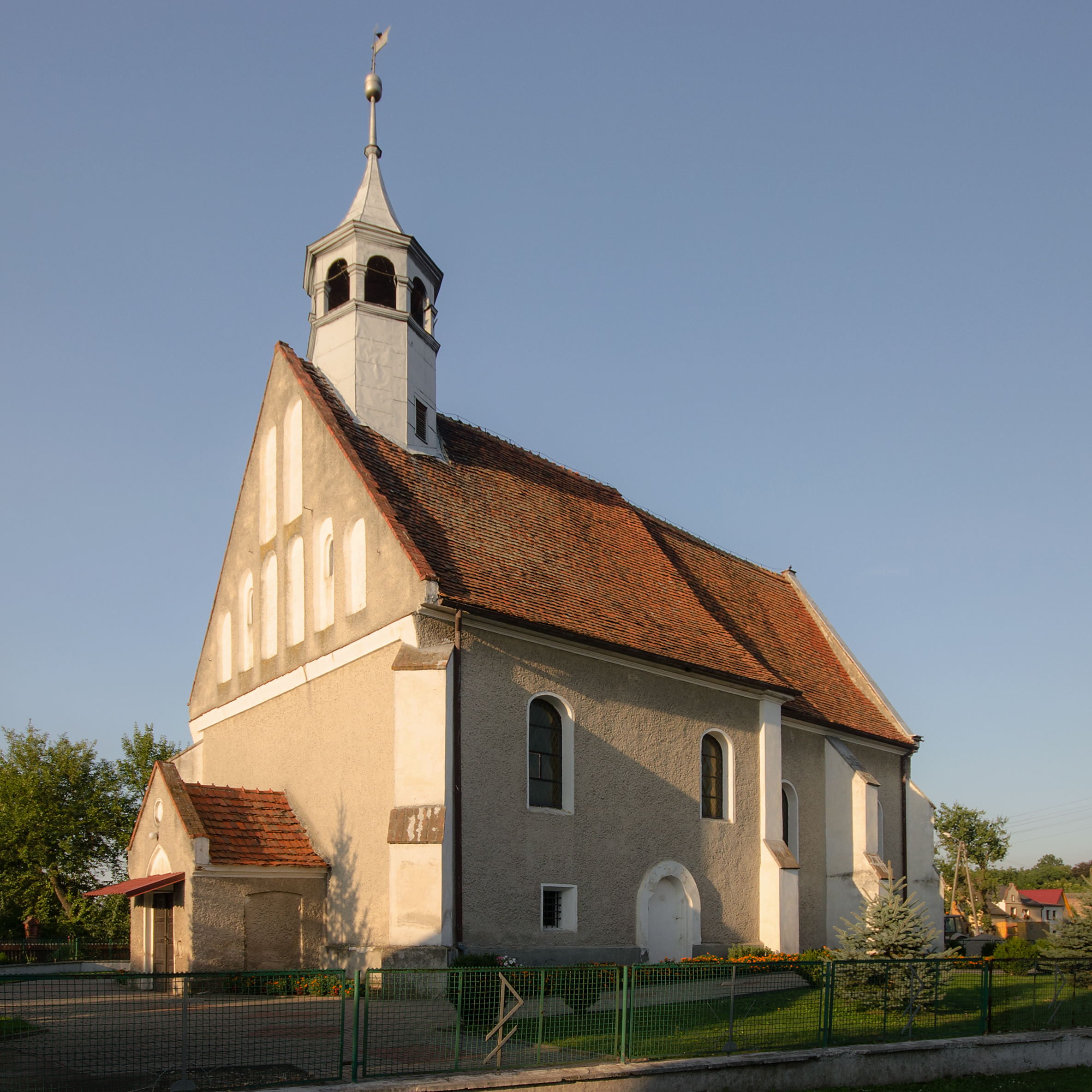 Osiek Grodkowski - rzymskokatolicki kościół filialny p.w. Wniebowzięcia NMP, XIV, XVI, XVIII